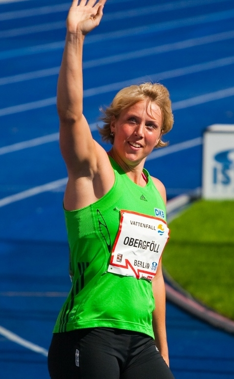 Christina Obergföll, Speerwerfen